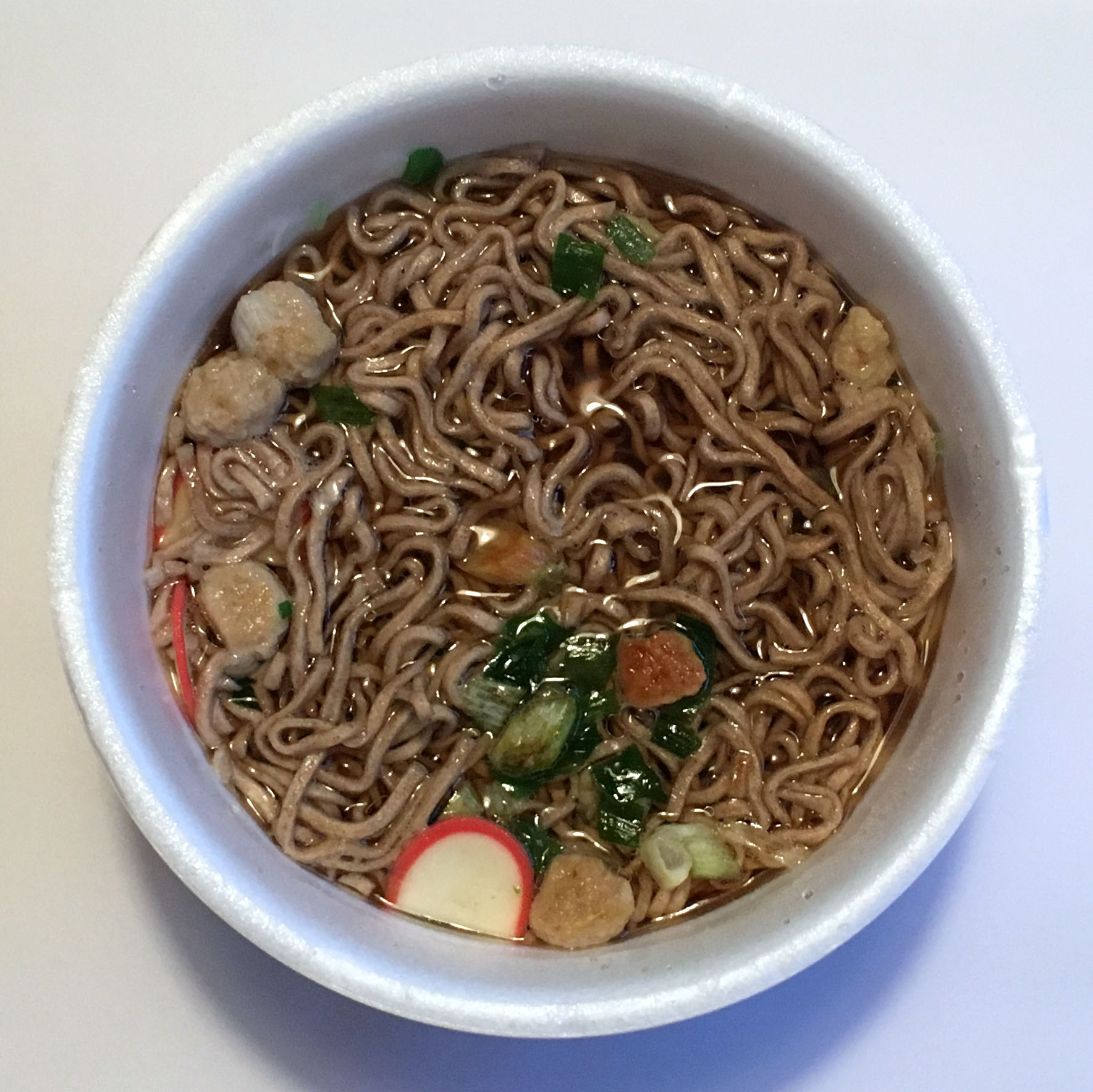 マルちゃん おそば屋さんの鴨だしそば